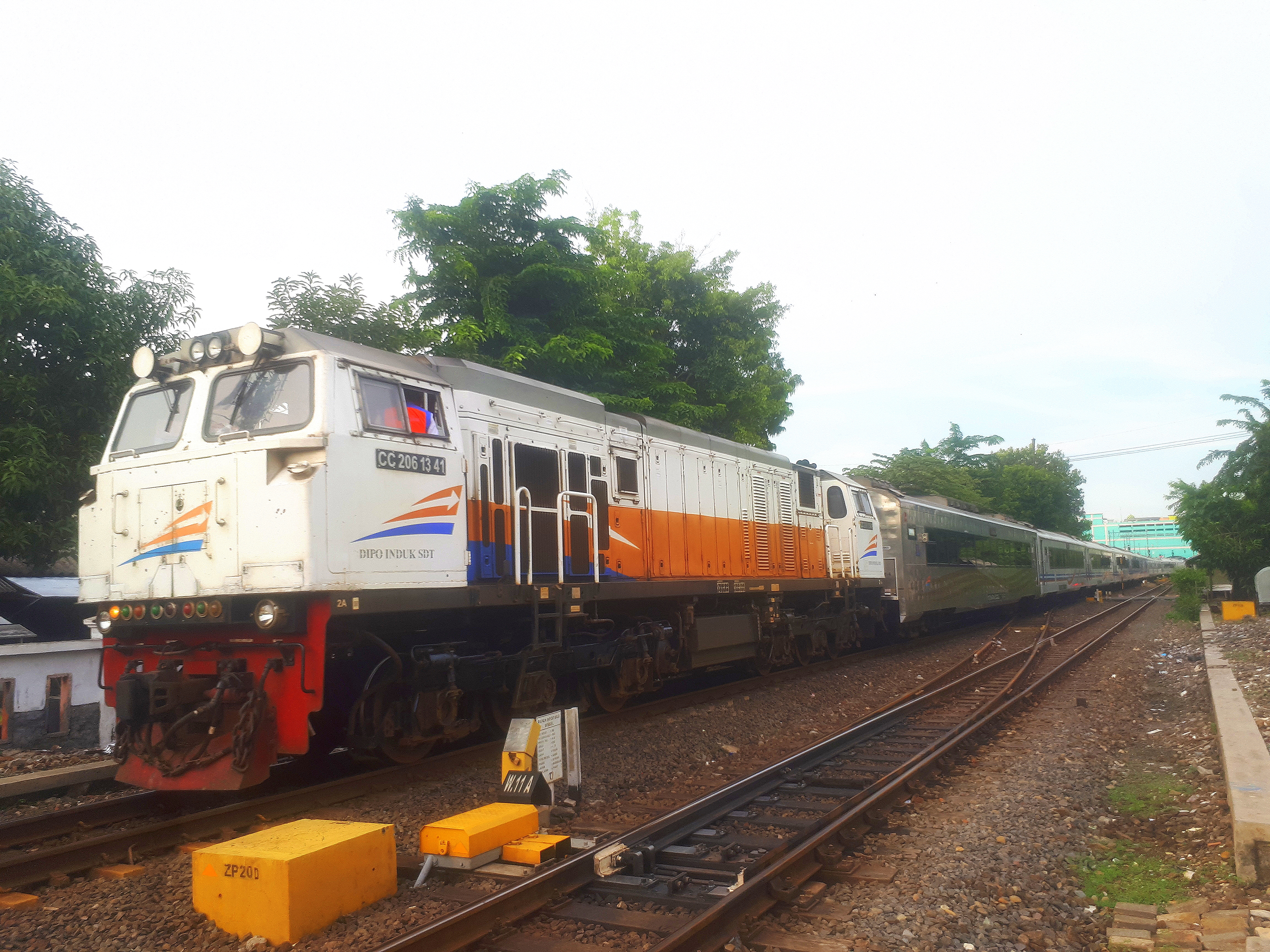 Rangkaian kereta api Sembrani saat akan langsir menuju Stasiun Surabaya Pasarturi, 10 Maret 2020